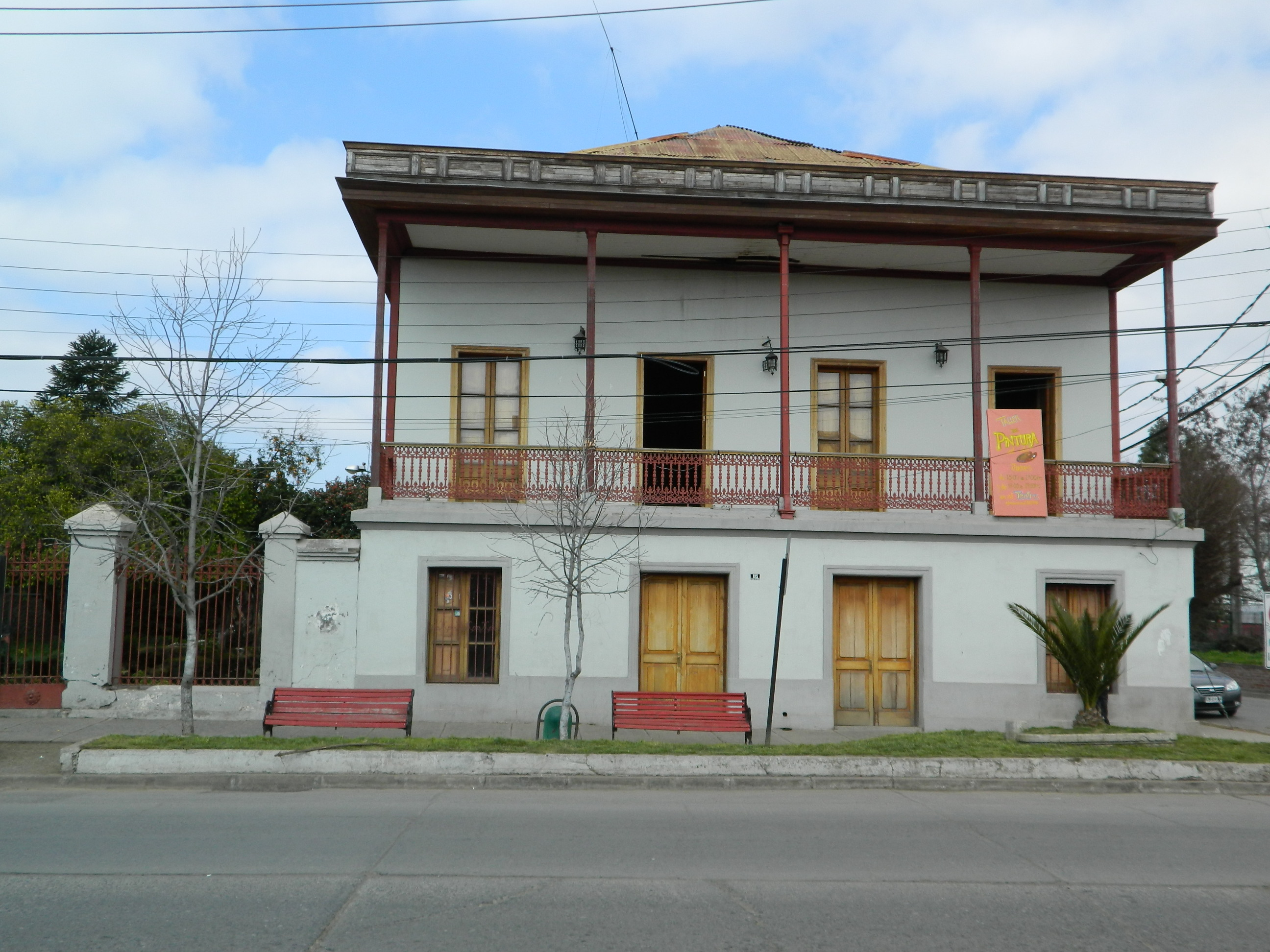 Casa Hodgkinson, llamada así por la primera familia que habitó ahí. En esta casa se construyó el primer automóvil de Chile, de la marca Citröen, al igual que el primer tranvía, carros del ferrocarril y una locomotora. También conocida como Casa San Luis. Actualmente usada como centro cultural y biblioteca de la ciudad de Graneros. This is a photo of a national monument in Chile: 360